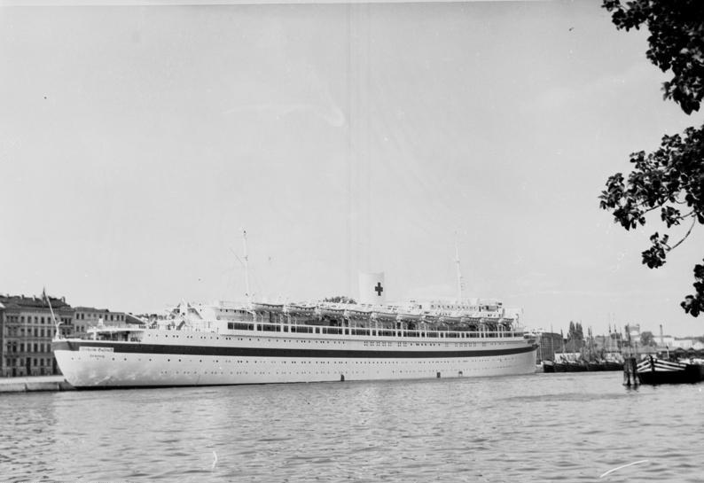 Das ehemalige KdF-Schiff "Wilhelm Gustloff" am Bollwerk von Stettin. Information added by Wikimedia users.